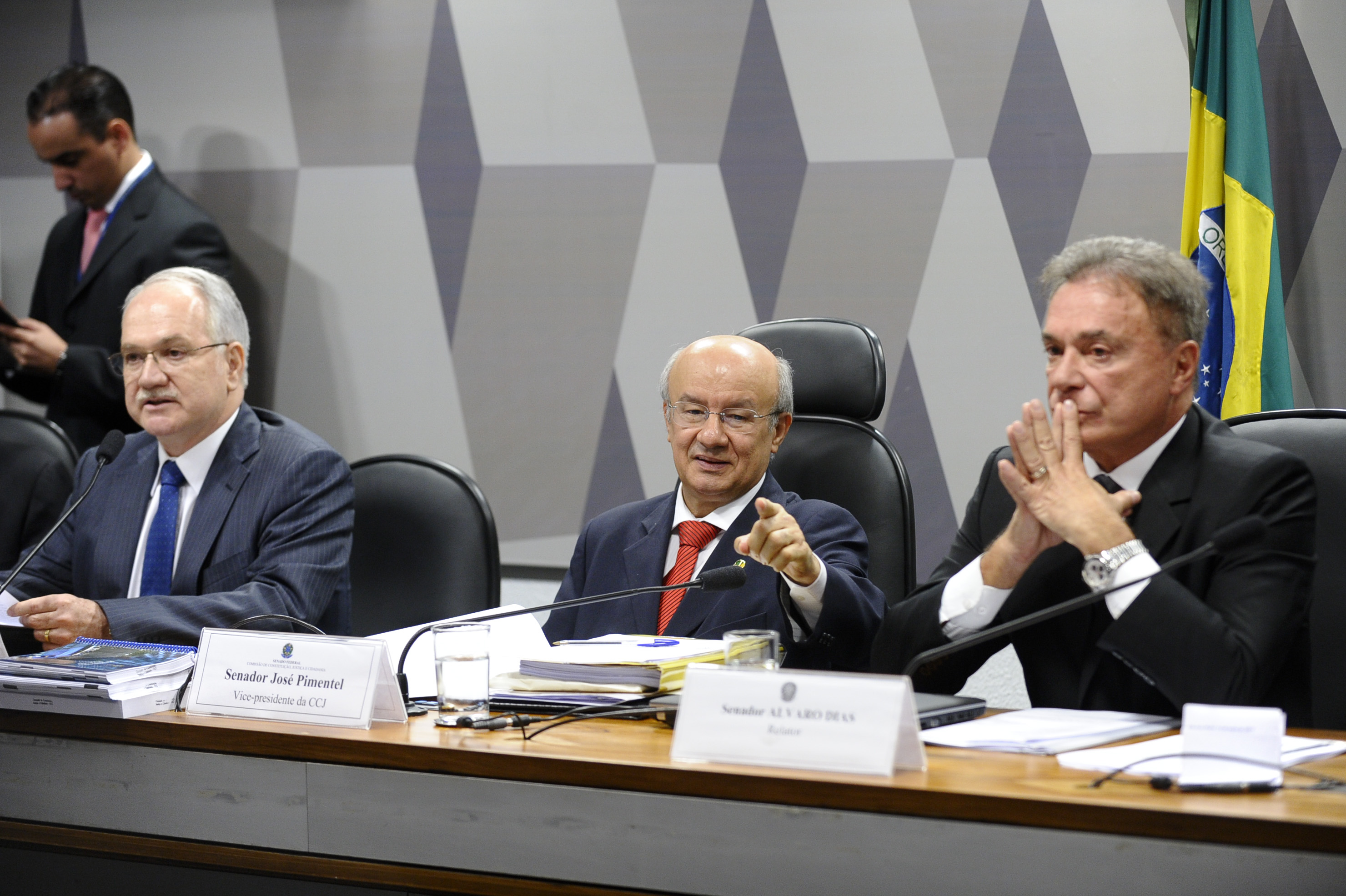 Sala de comissões do Senado Federal durante reunião da Comissão de Constituição, Justiça e Cidadania (CCJ). Comissão analisa indicação de Luiz Edson Fachin para exercer o cargo de Ministro do Supremo Tribunal Federal (STF) na vaga decorrente da aposentadoria do ministro Joaquim Benedito Barbosa Gomes. Mesa (E/D): advogado Luiz Edson Fachin; vice-presidente da CCJ, senador José Pimentel (PT-CE); relator, senador Alvaro Dias (PSDB-PR) Foto: Marcos Oliveira/Agência Senado